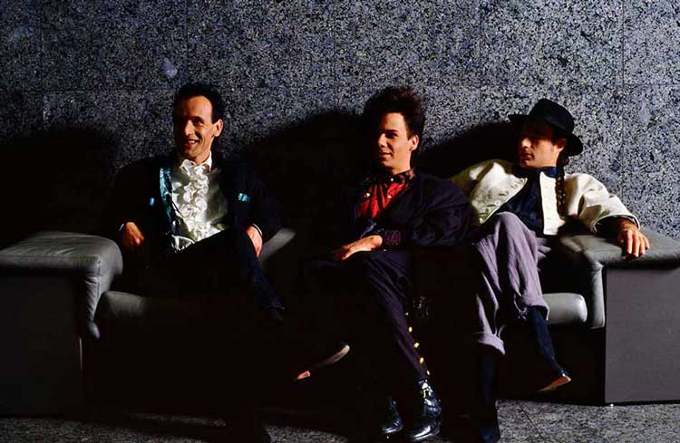 Split Mirrors (1985)